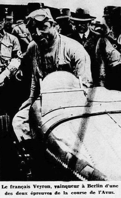 Pierre Veyron en juin 1934 à l'AVUS.